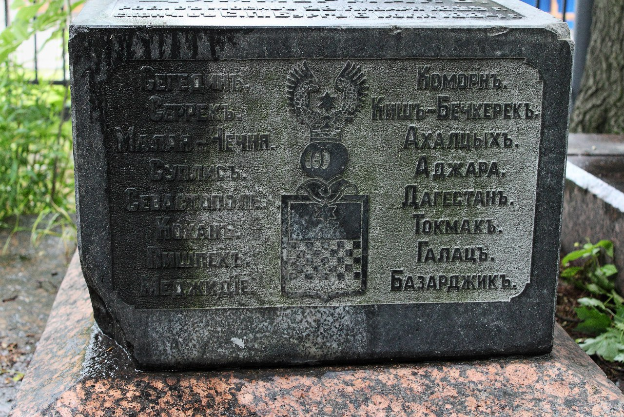 Могила генерала Циммермана на Новодевичьем кладбище в Санкт-Петербурге. Надпись на могиле перечисляет географические места, за которые сражался Циммерман. Левый столбец: Сегедин. Серрек. Малая Чечня. Супплис. Севастополь. Кокан. Пишпек. Меджкдие. Правый столбец: Коморн. Киш-Бечкерек. Ахалцых. Аджара. Дагестан. Токмак. Галац. Базарджик